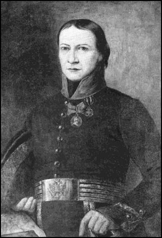 Josef Eisenstecken, österreichischer Mjr.